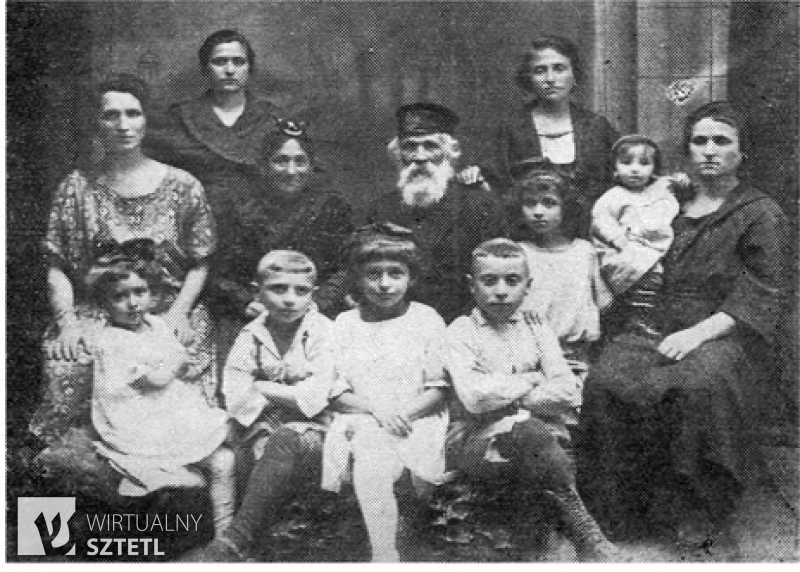 משפחת הרש היהודיה בעיירה סוקולוב פודלסקי. אב המשפחה היה הקצב בעיירה